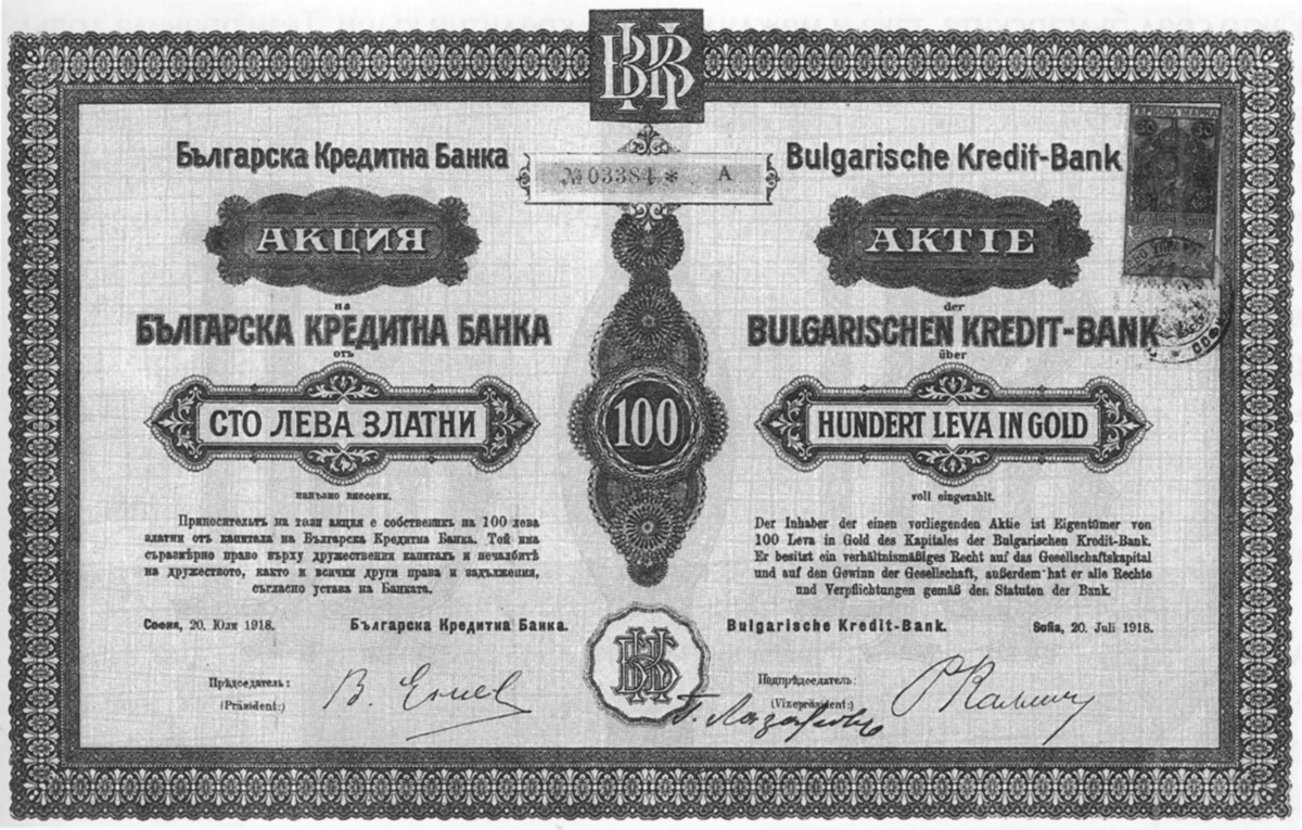 Акция на Българска кредитна банка